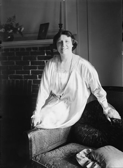 Leila Megane (1891–1960), Welsh mezzo-soprano